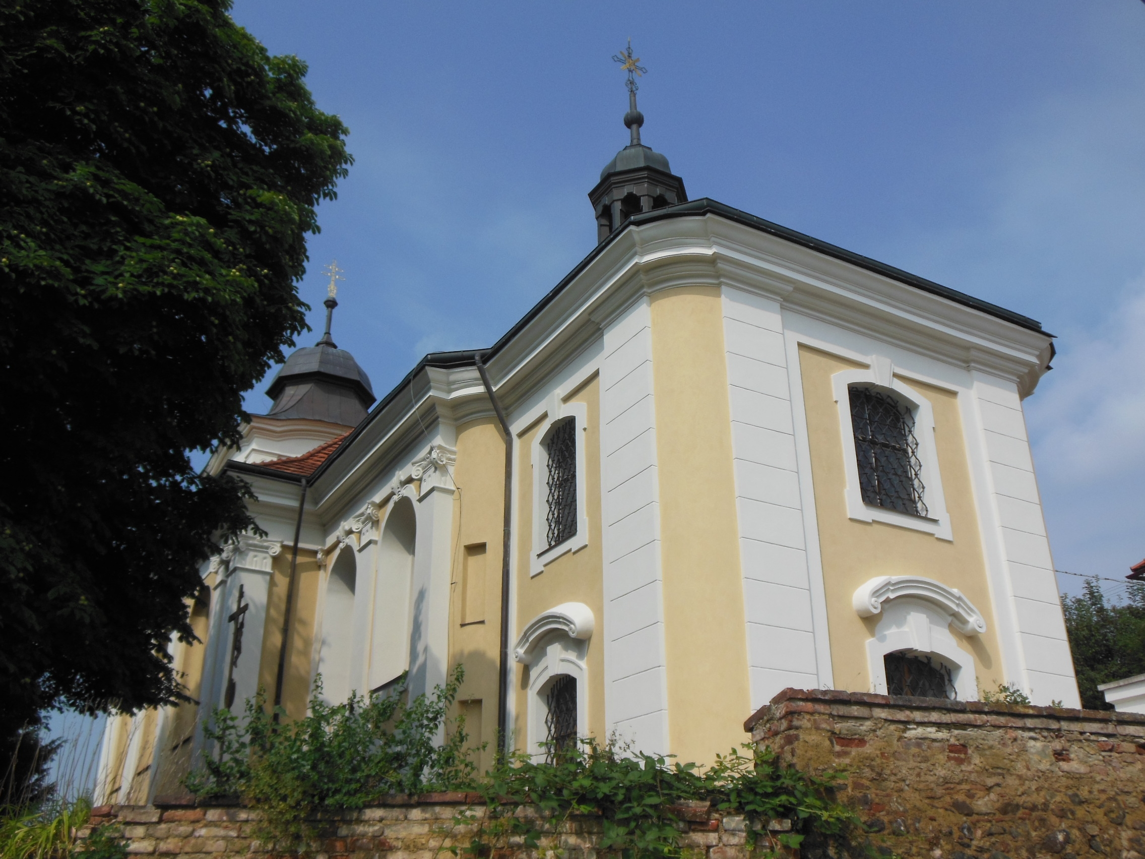 Kostel Nanebevzetí Panny Marie v Úněticích (okr. Praha-západ). Stav po rekonstrukci v roce 2013.